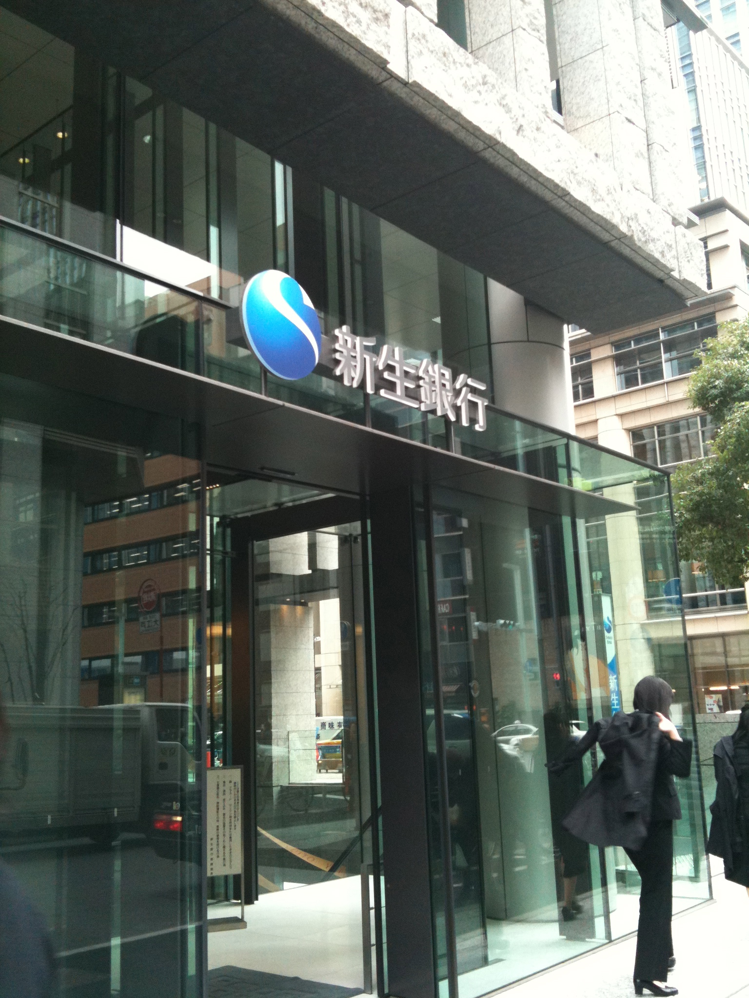 2011年に移転した新しい本店ビルの入口です